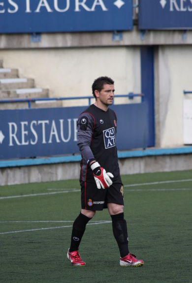 Javi Ruiz, portero del R.C.D. Español, durante el partido del centenario del C.E. Europa en el Nou Serdenya